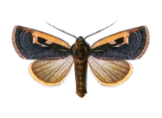 [Episilia] retracta (Hmpsn.) = Xestia retracta (Hampson, 1903), ♂, Sikkim ("Sikhim").